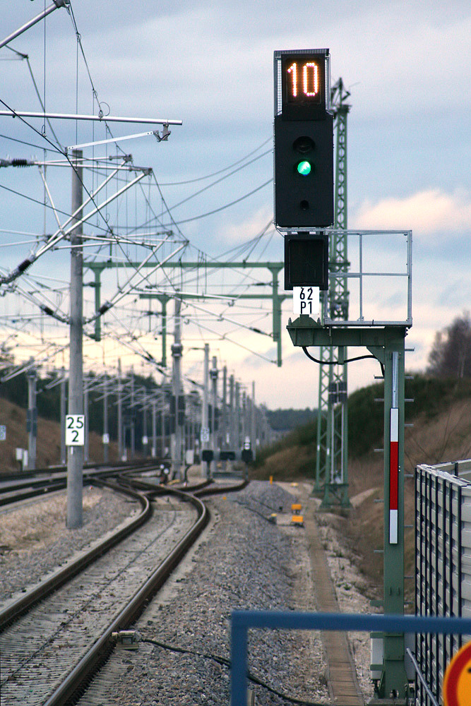 Ks-Signale in Bahnhof Allersberg.